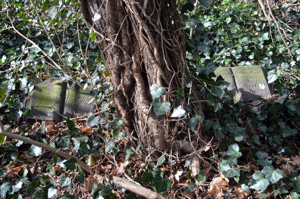 Braunschweig, Andreasfriedhof: Zwei Grabsteine für mehrere Personen namens „Gauß“.